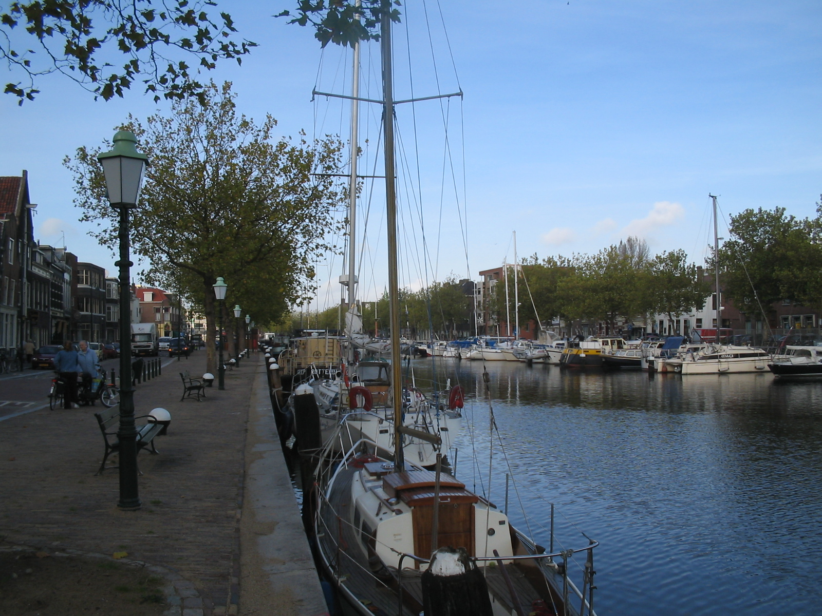 Oude Haven Vlaardingen, Netherlands (26 okt 2005)